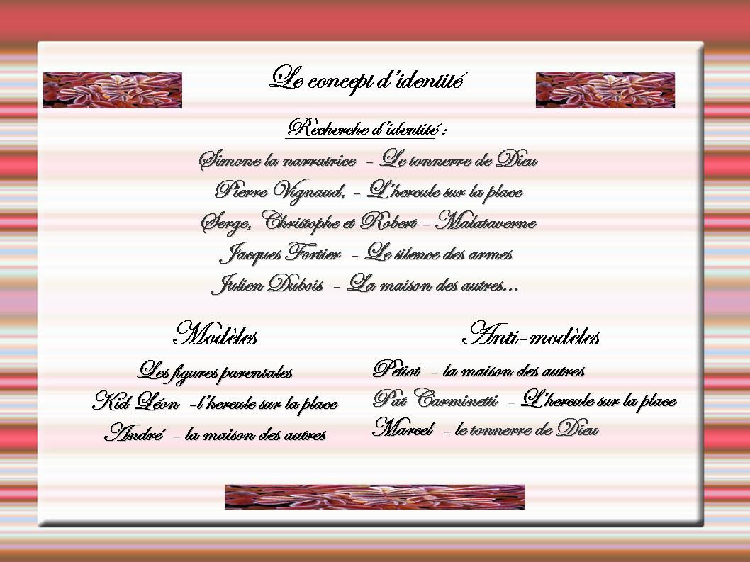 Diagramme d'identité sur des personnages de Bernard Clavel